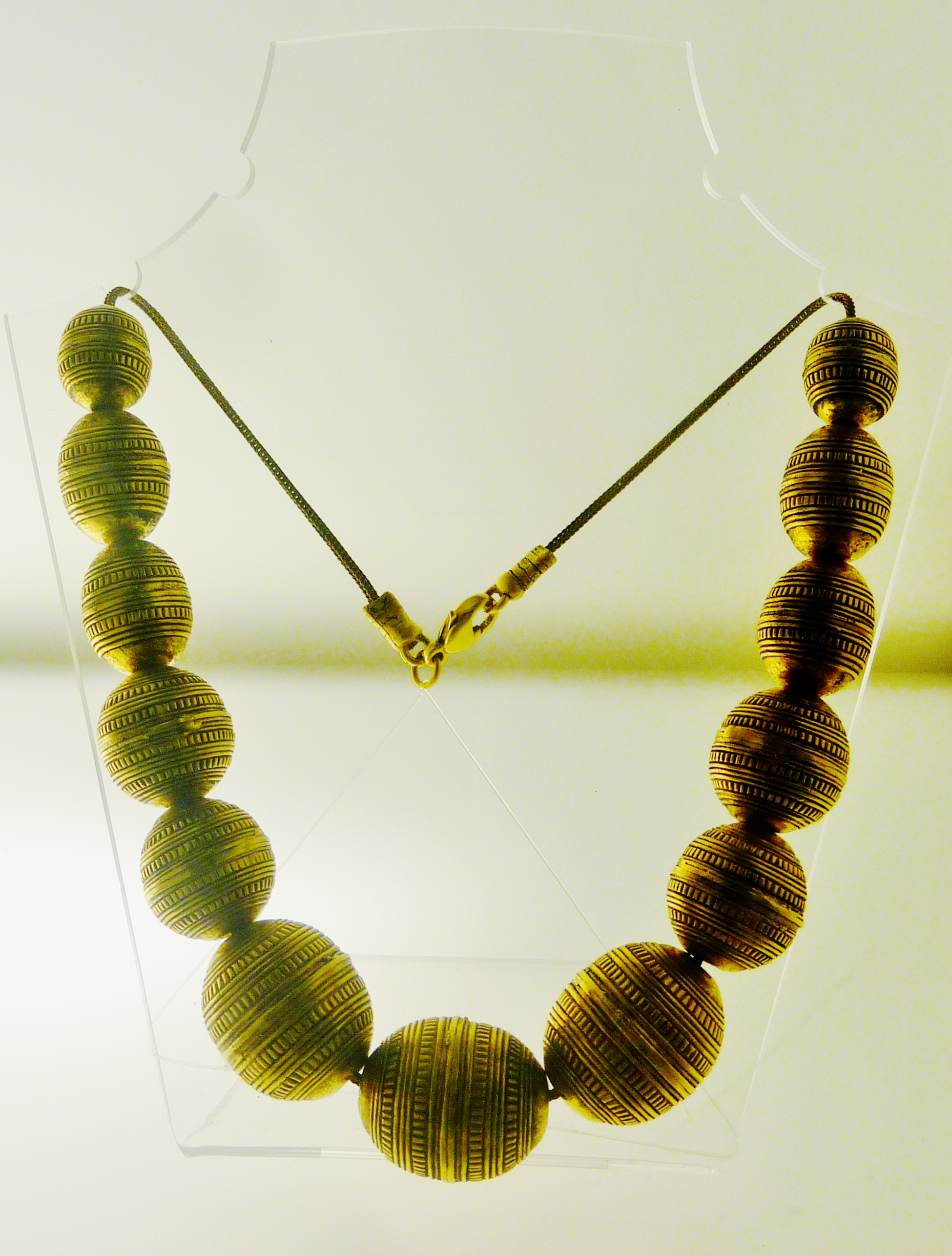 Le collier de Tréglonou, formé de boules dorées et ciselées en cuivre, daté entre le IXe et le Ve siècles avant Jésus-Christ (conservé au Musée départemental breton de Quimper ; une copie se trouve au Musée du Léon à Lesneven).